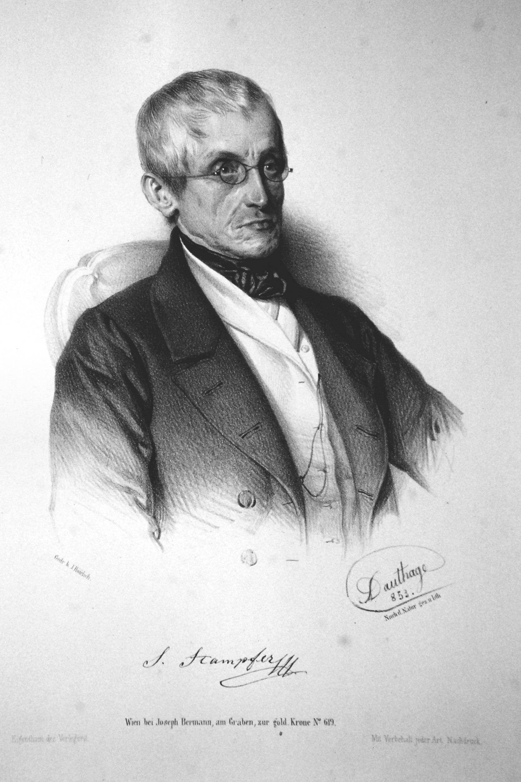 Simon Stampfer (1792-1864), österreichischer Mathematiker, Geodät und Erfinder. Lithographie von Adolf Dauthage, 1853